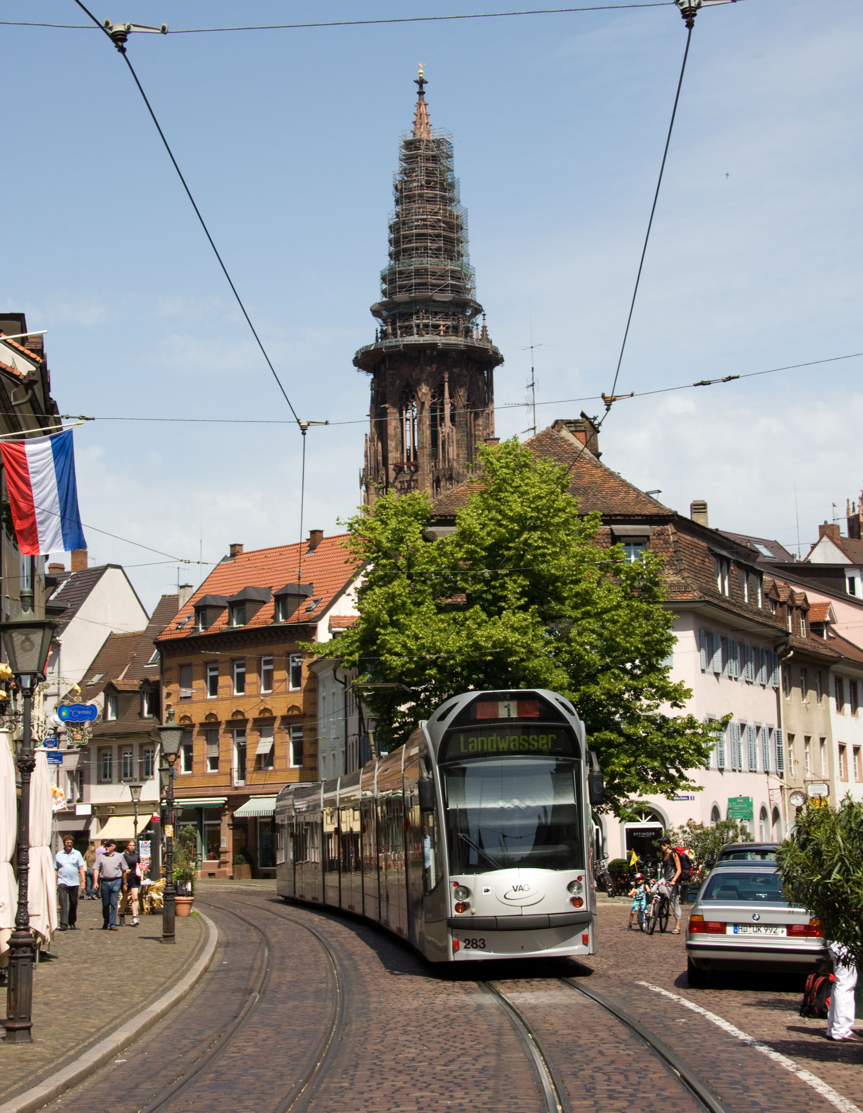 Combino in der Salzstraße